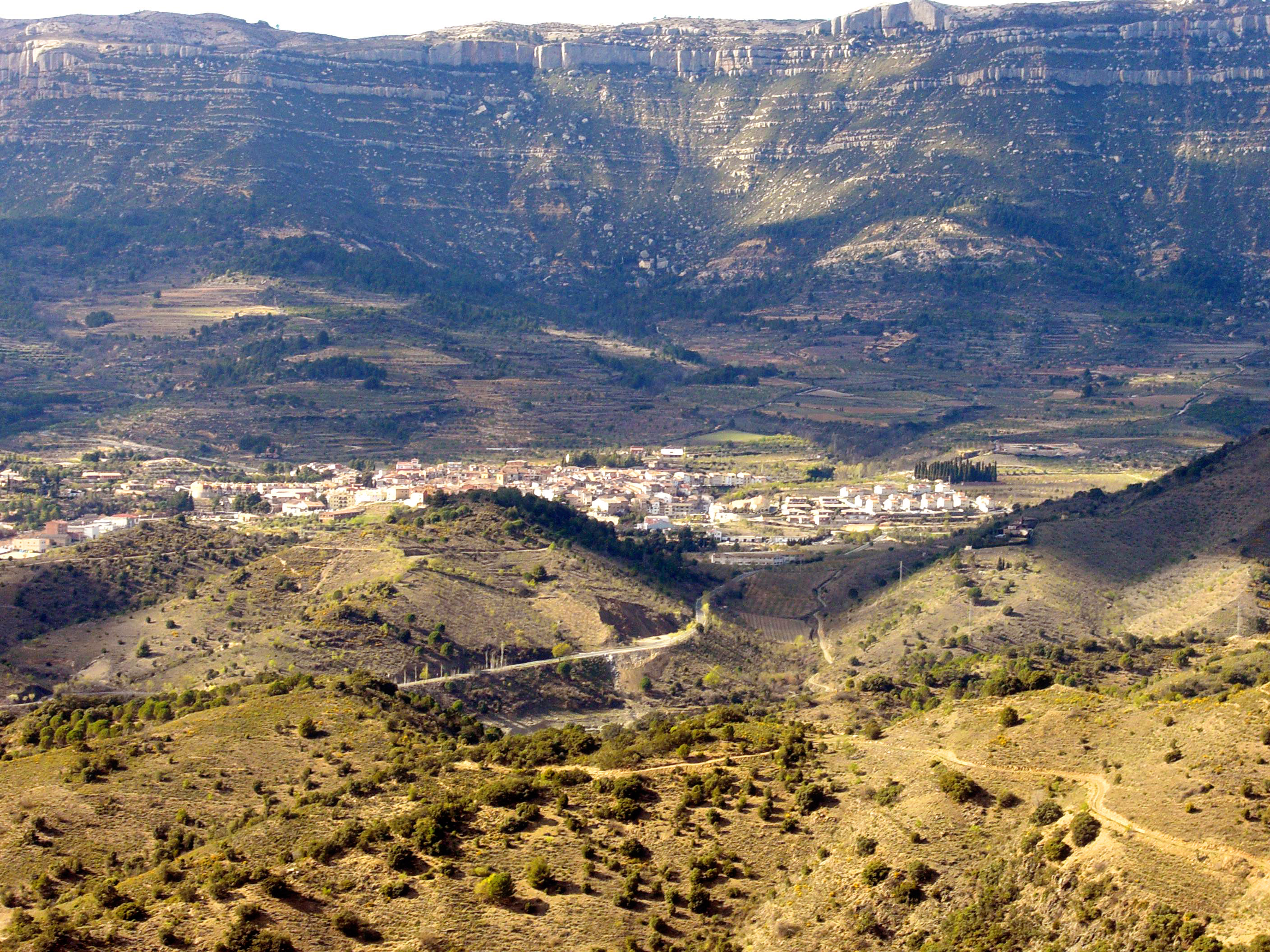 Vista de Cornudella